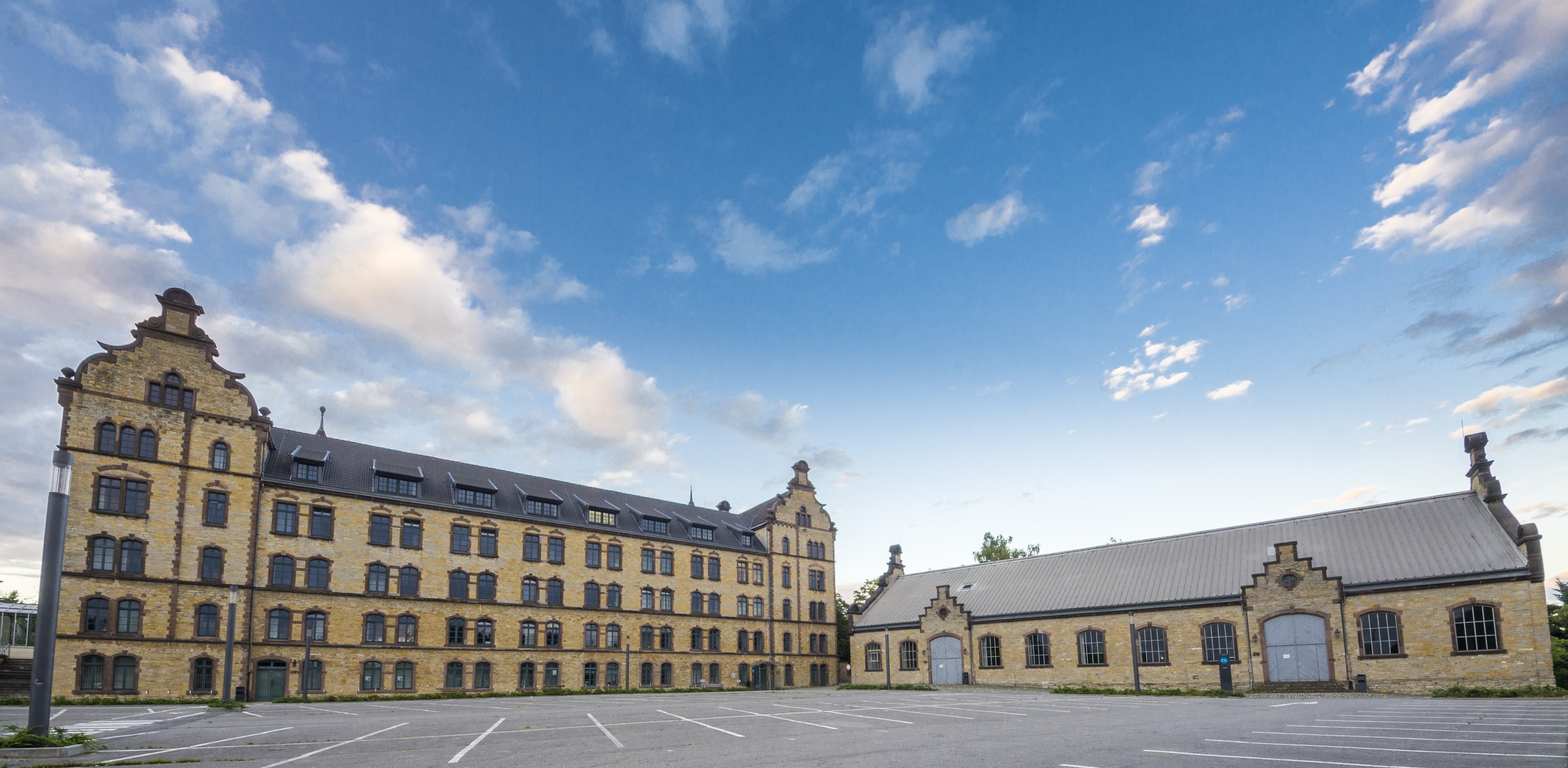 Ehemalige Caprivikaserne, jetzt Hochschule Osnabrück.